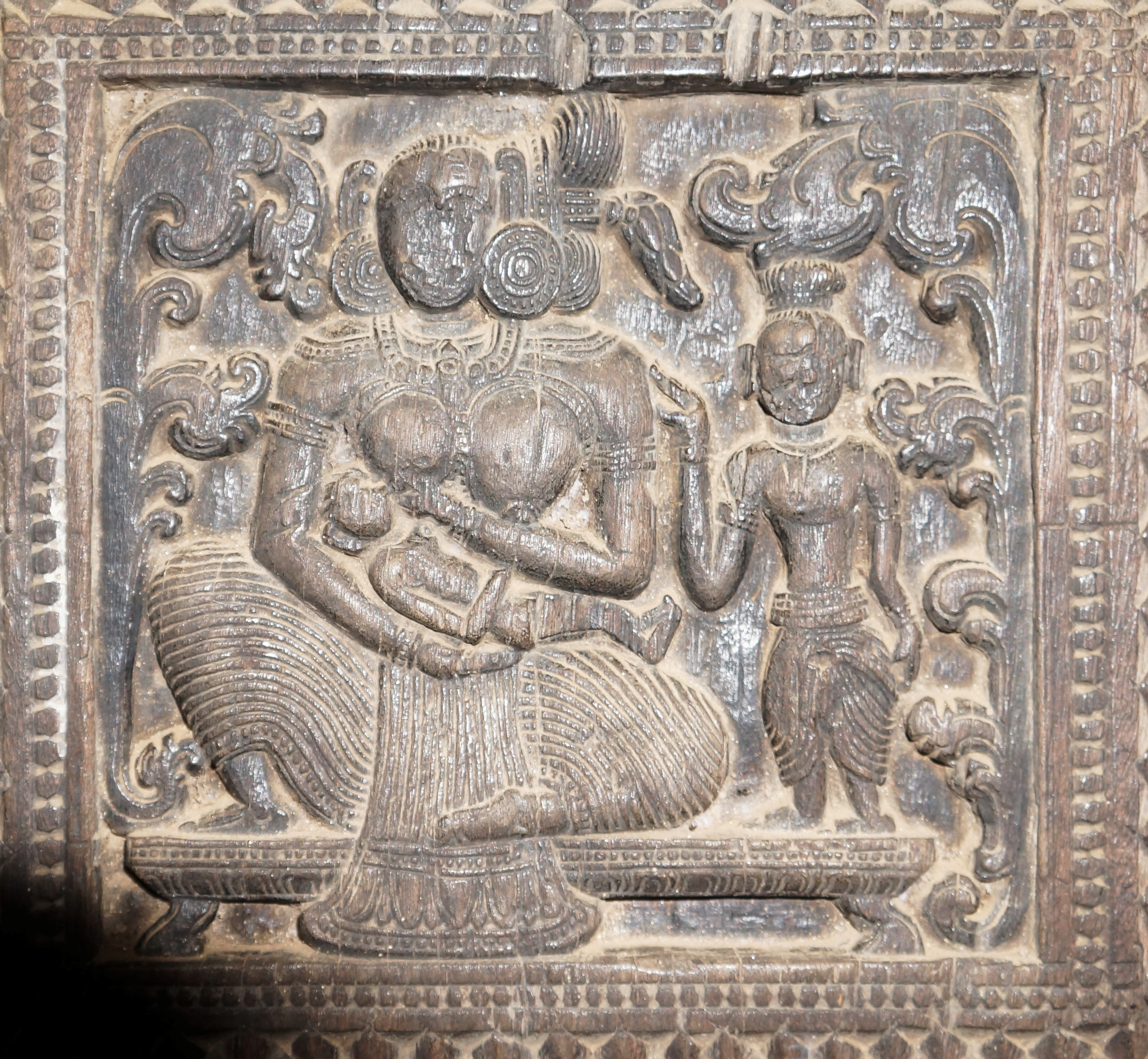 Nourrice, boiserie du temple Embekka Devalaya à Kandy Sri Lanka.- Asie du Sud